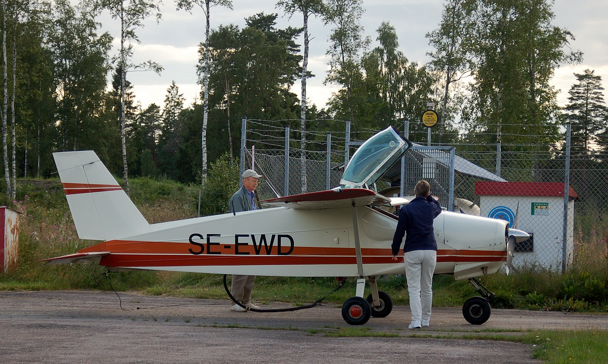 MFI-9B SE-EWD at ESSH Sweden